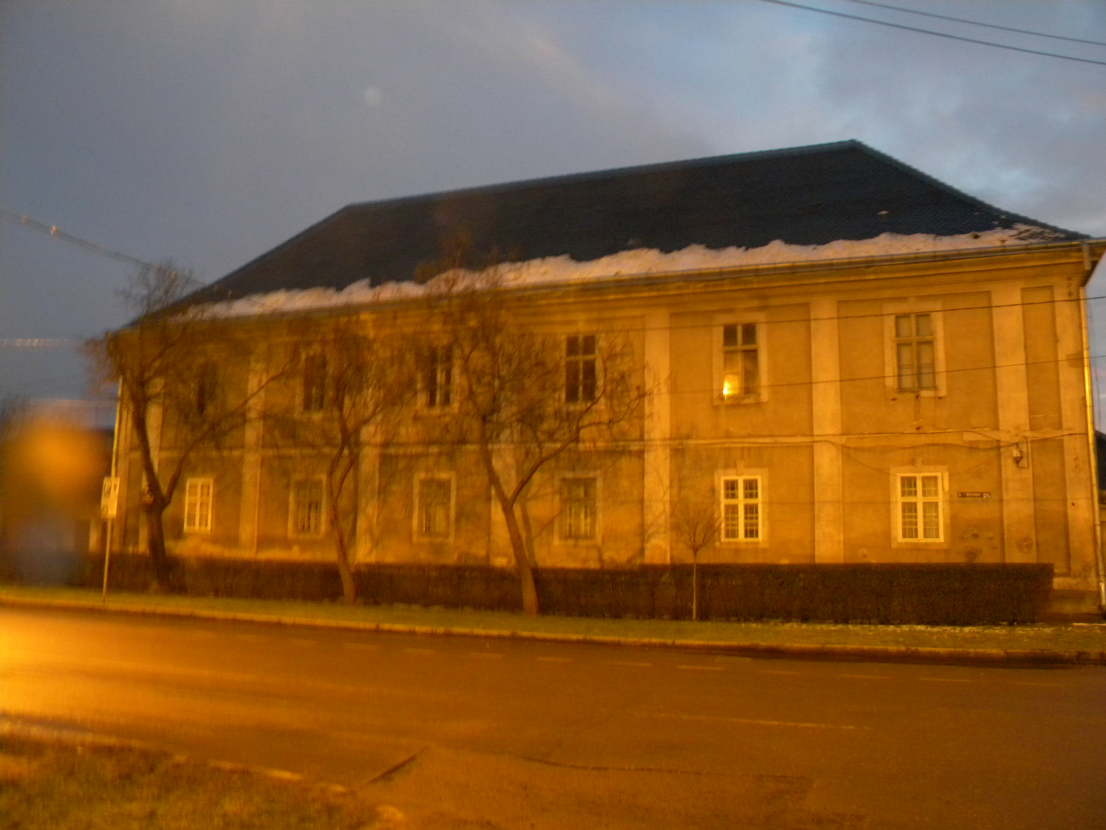 Kanonokpalota